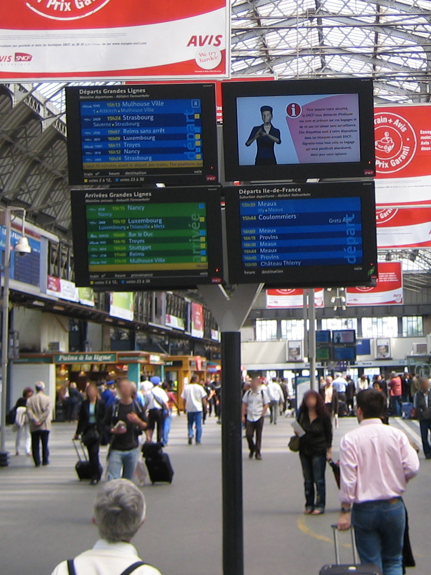 Groupe d'écrans TFT en gare de Paris Est dont l'un présente une annonce en LSF avec l'avatar Jade